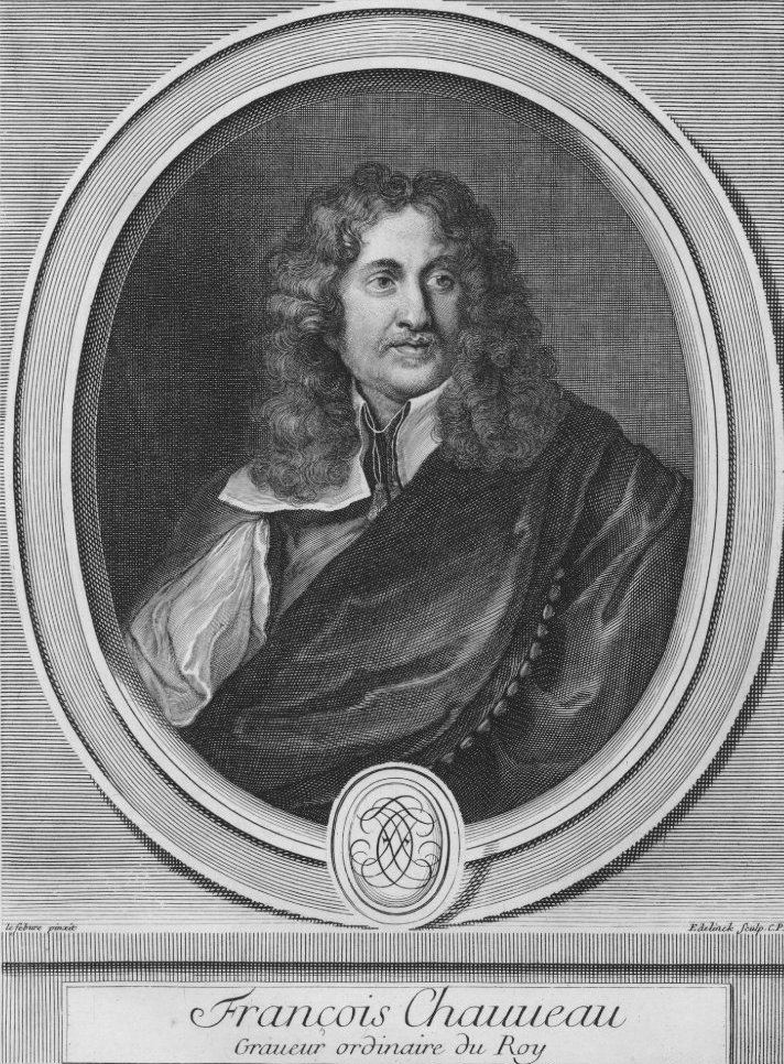 Kupferstich Portrait, 1700, gestochen von Gérard Edelinck nach Claude Lefebvre